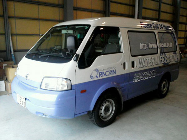 クラシアンカー